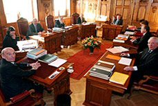 Beschreibung: Bundesratszimmer im Bundeshuus in Bern (Parlamentsgebäude) Quelle: Parlamentsdienste der Bundesversammlung Copyright Status: GNU Freie Dokumentationslizenz; Publikation mit Genehmigung der Parlamentsdienste der Bundesversammlung